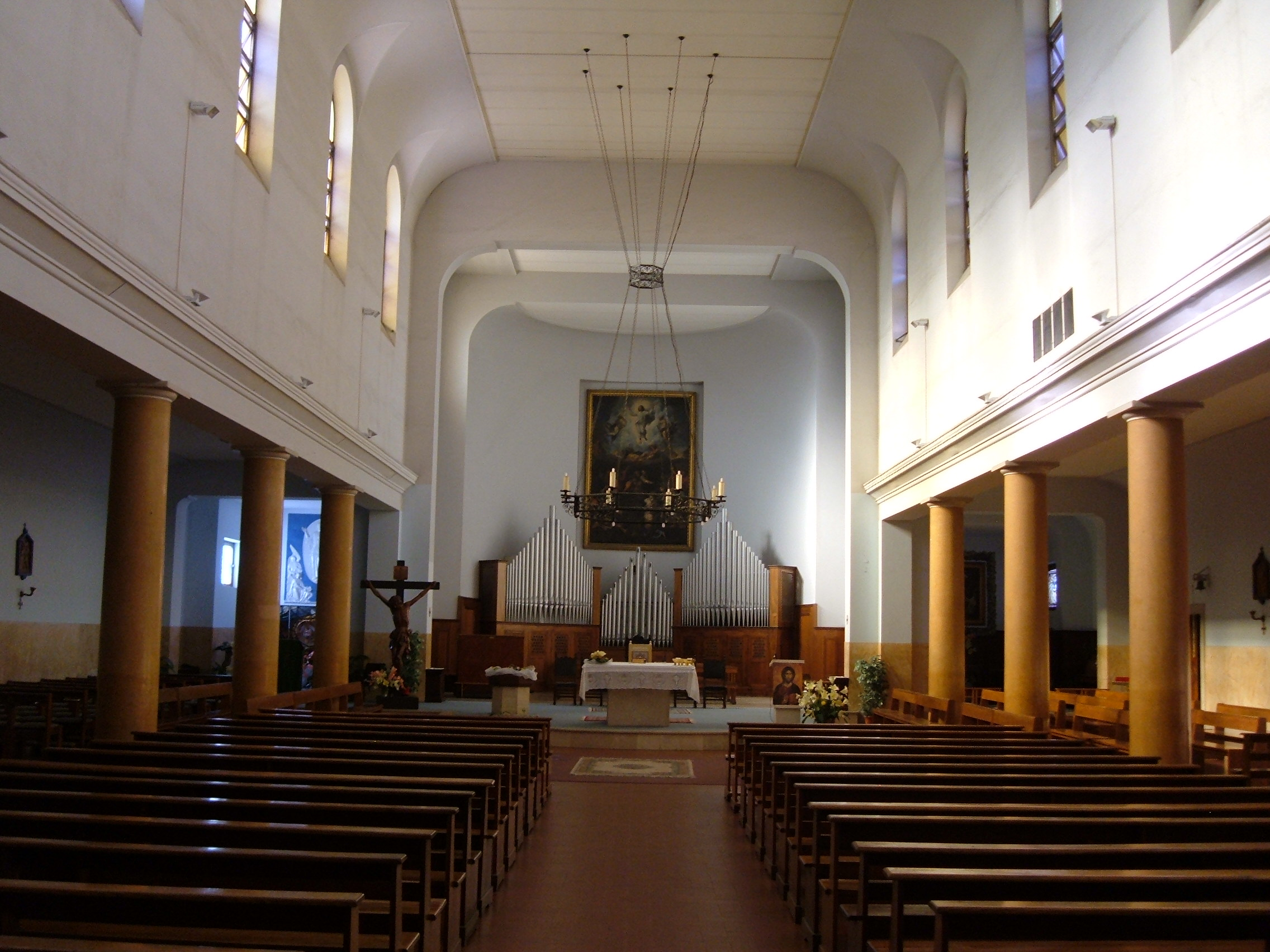 Chiesa della Trasfigurazione di Nostro Signore Gesù Cristo, a Roma, nel quartiere Gianicolense.